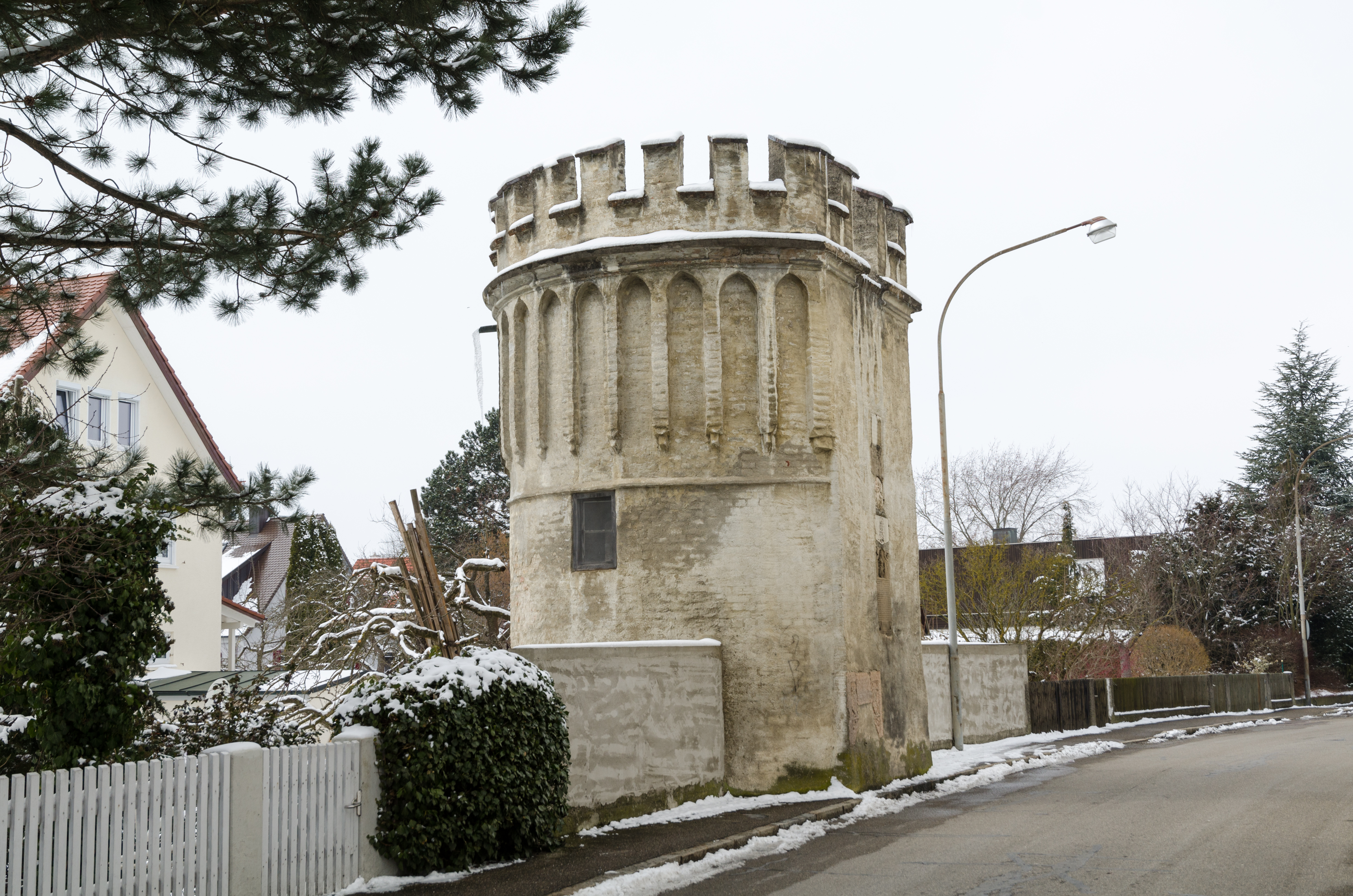 Lauingen, Oberer Schanzweg 17